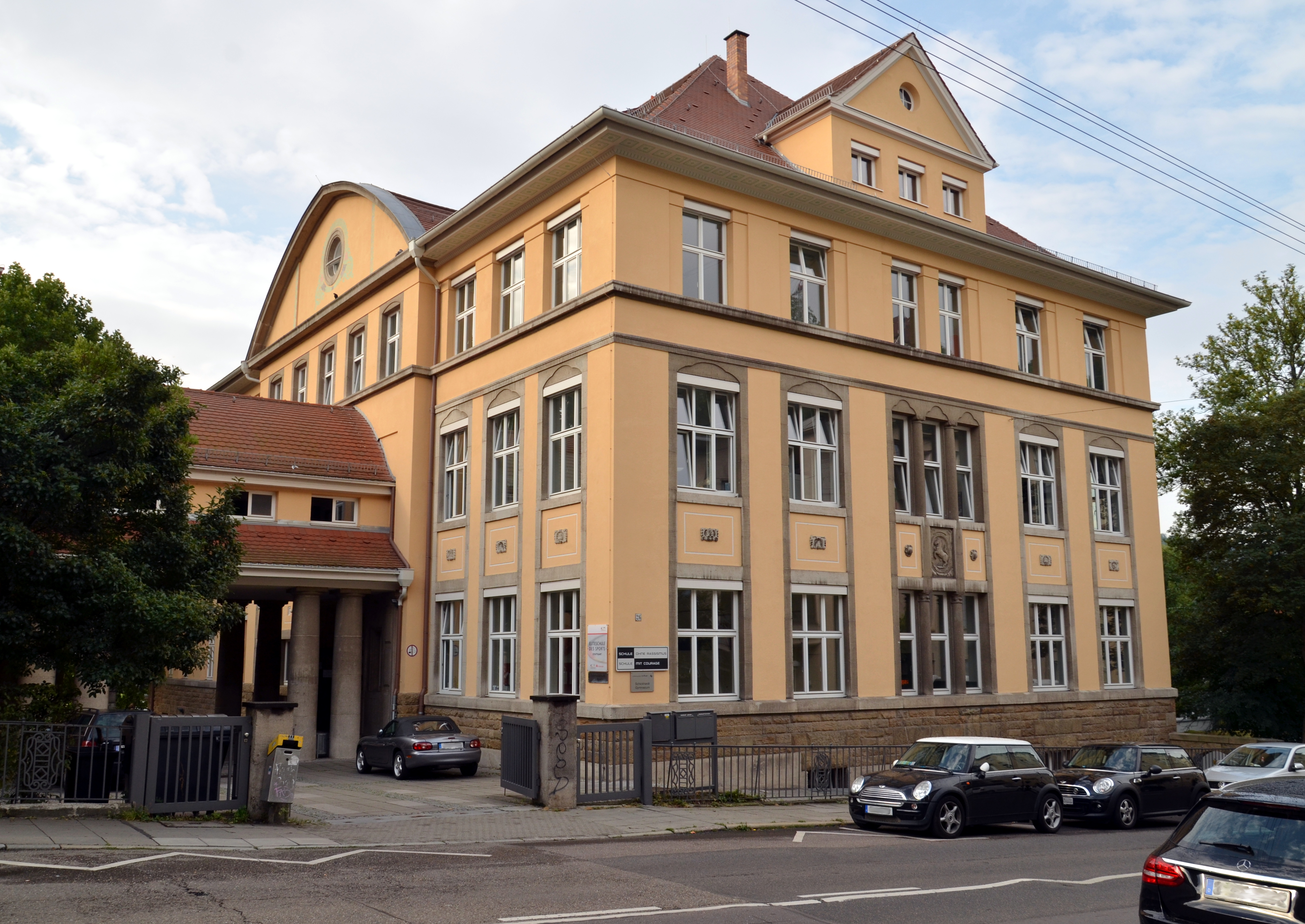 Schickhardt-Gymnasium Stuttgart: Vorderansicht des Hauptgebäudes